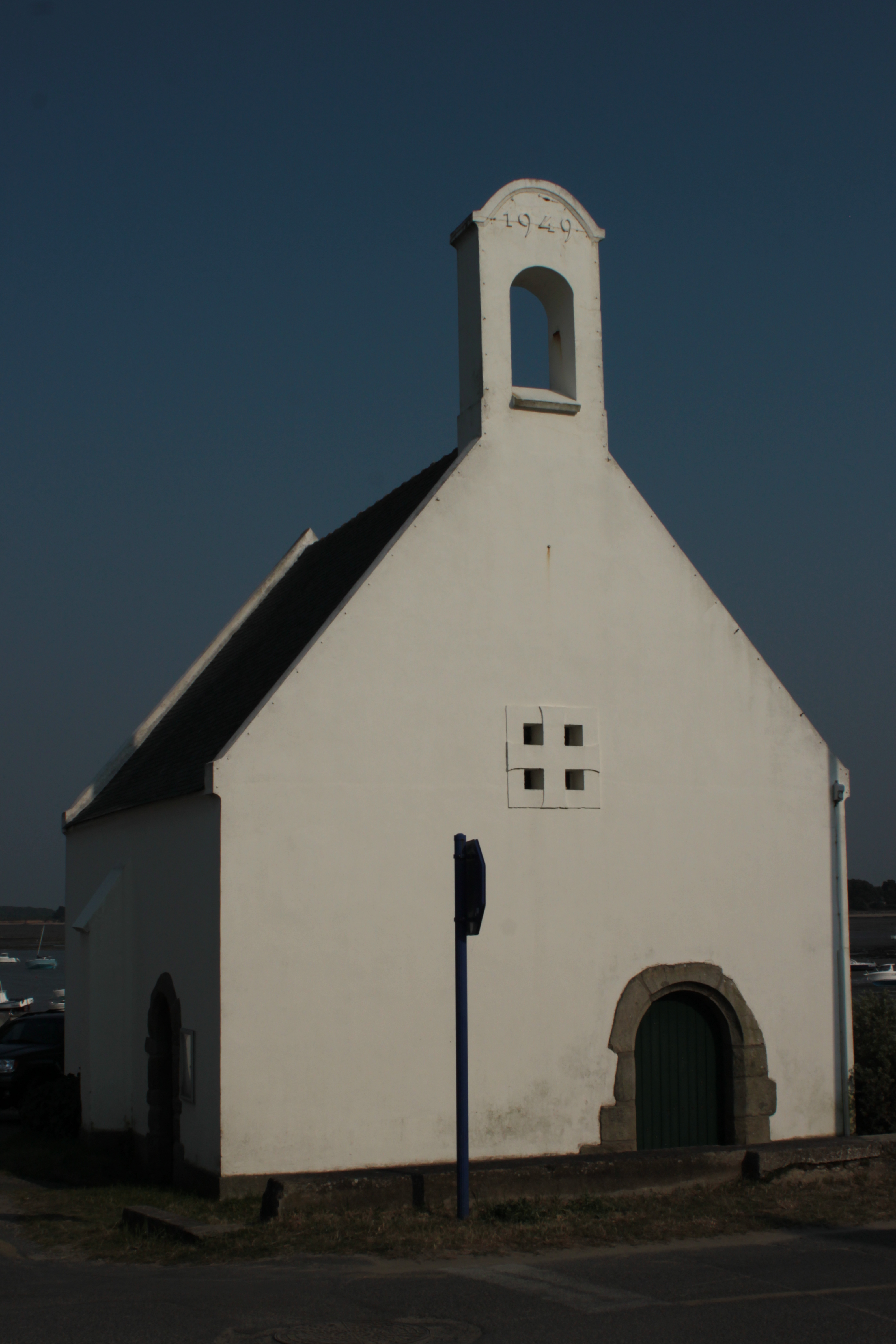 Chapelle Notre-Dame-de-Kercabellec, 1949, Merkel, Mesquer.